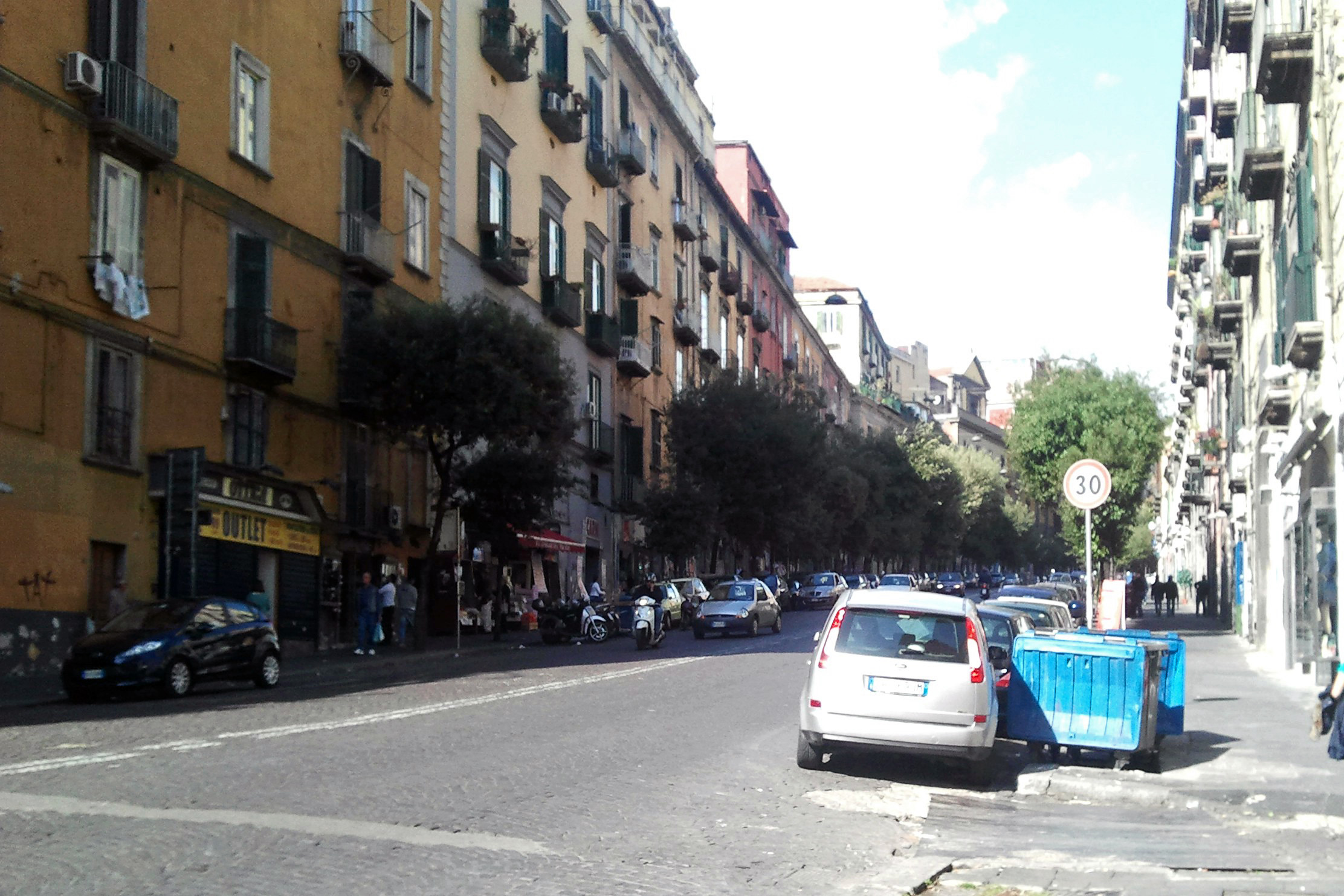 Via Santa Teresa degli Scalzi a Napoli ripresa dal Museo Archeologico